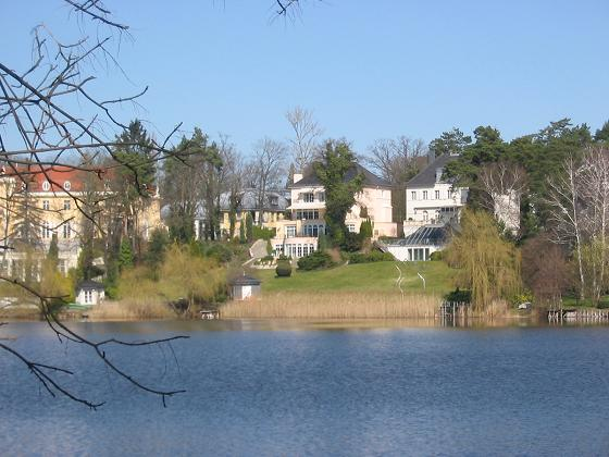 Hundekehlesee, Berlin